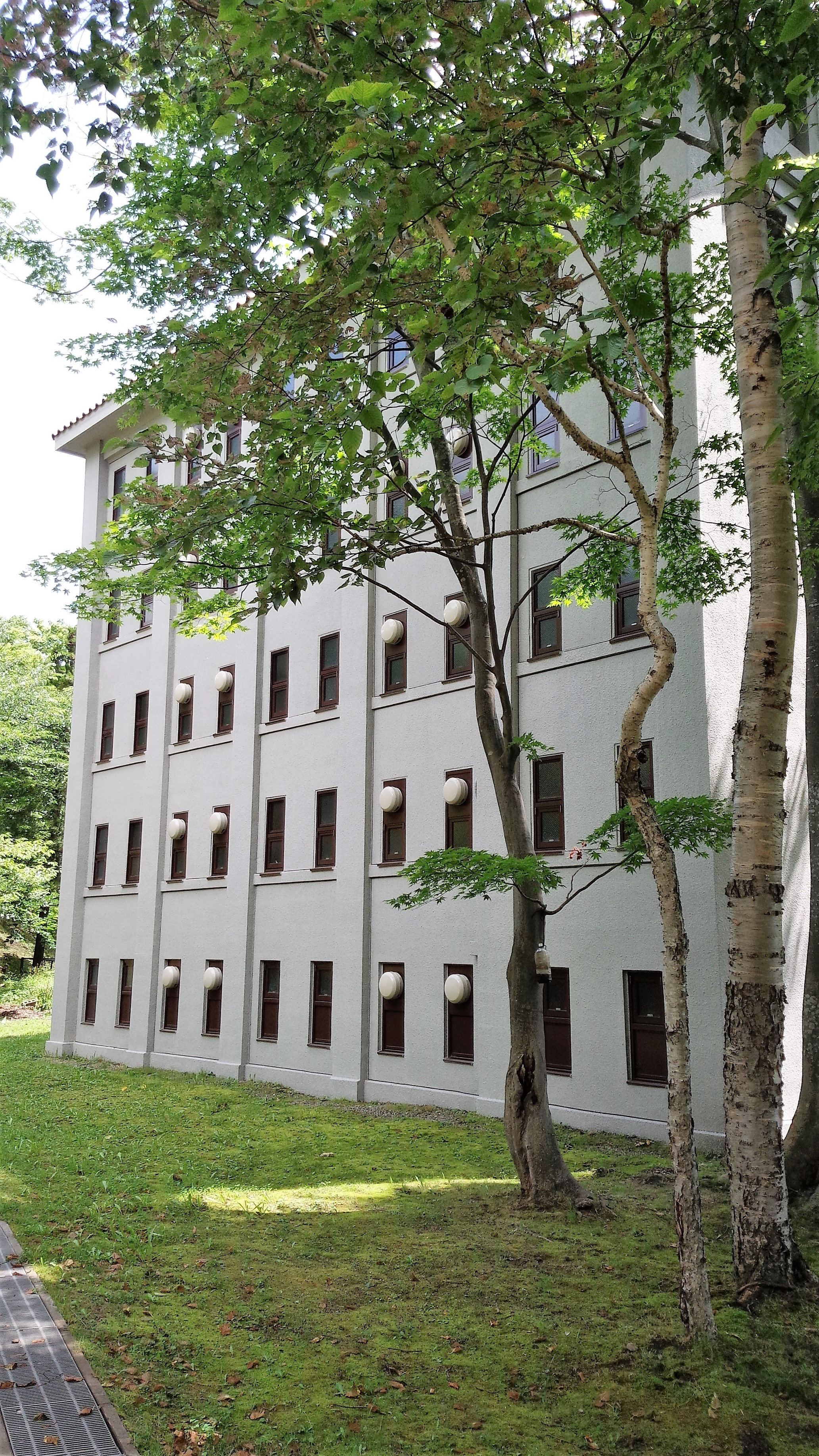 市立函館図書館書庫（函館公園内、2014年8月）